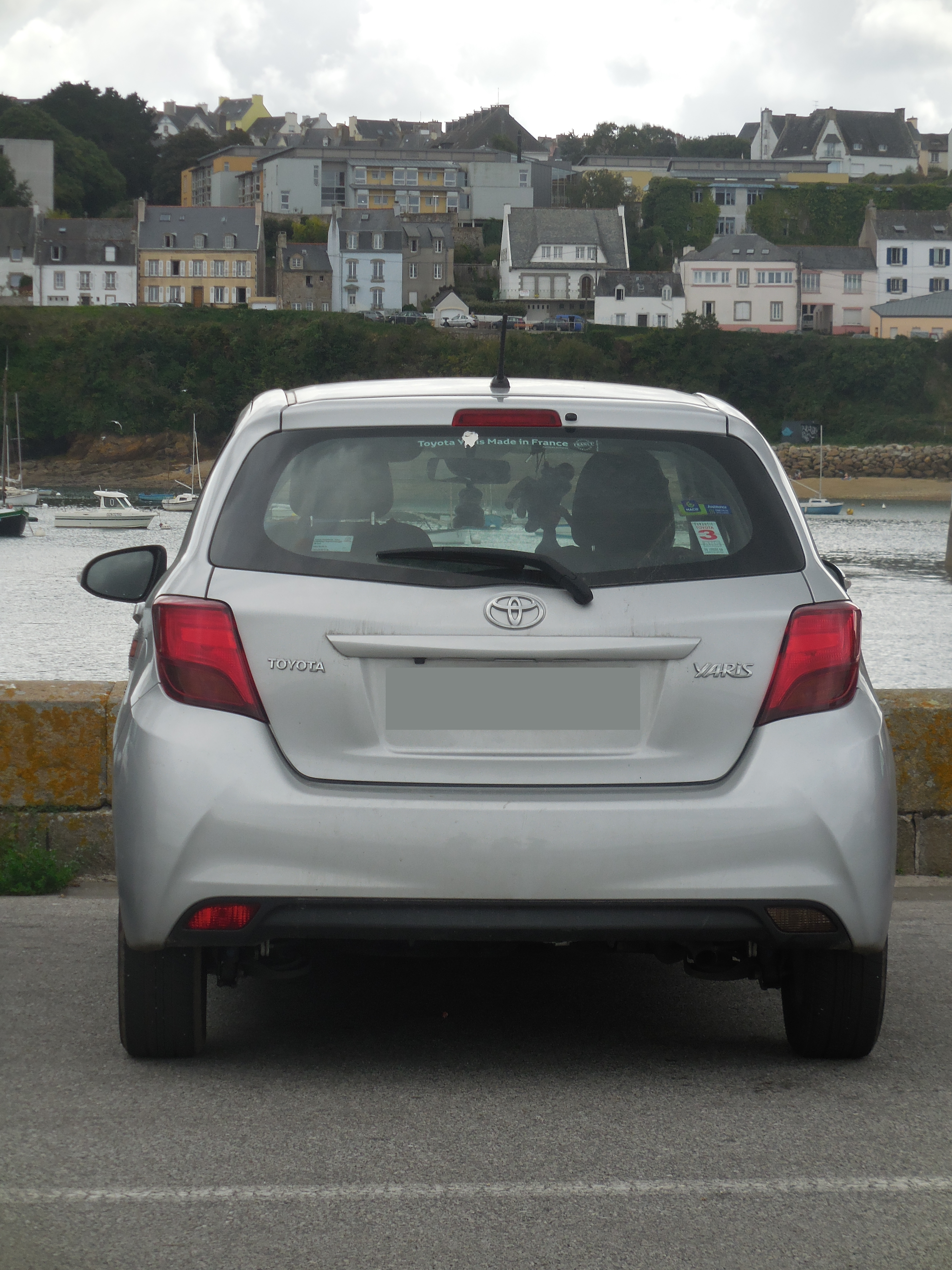 Toyota Yaris (restylage de 2014)